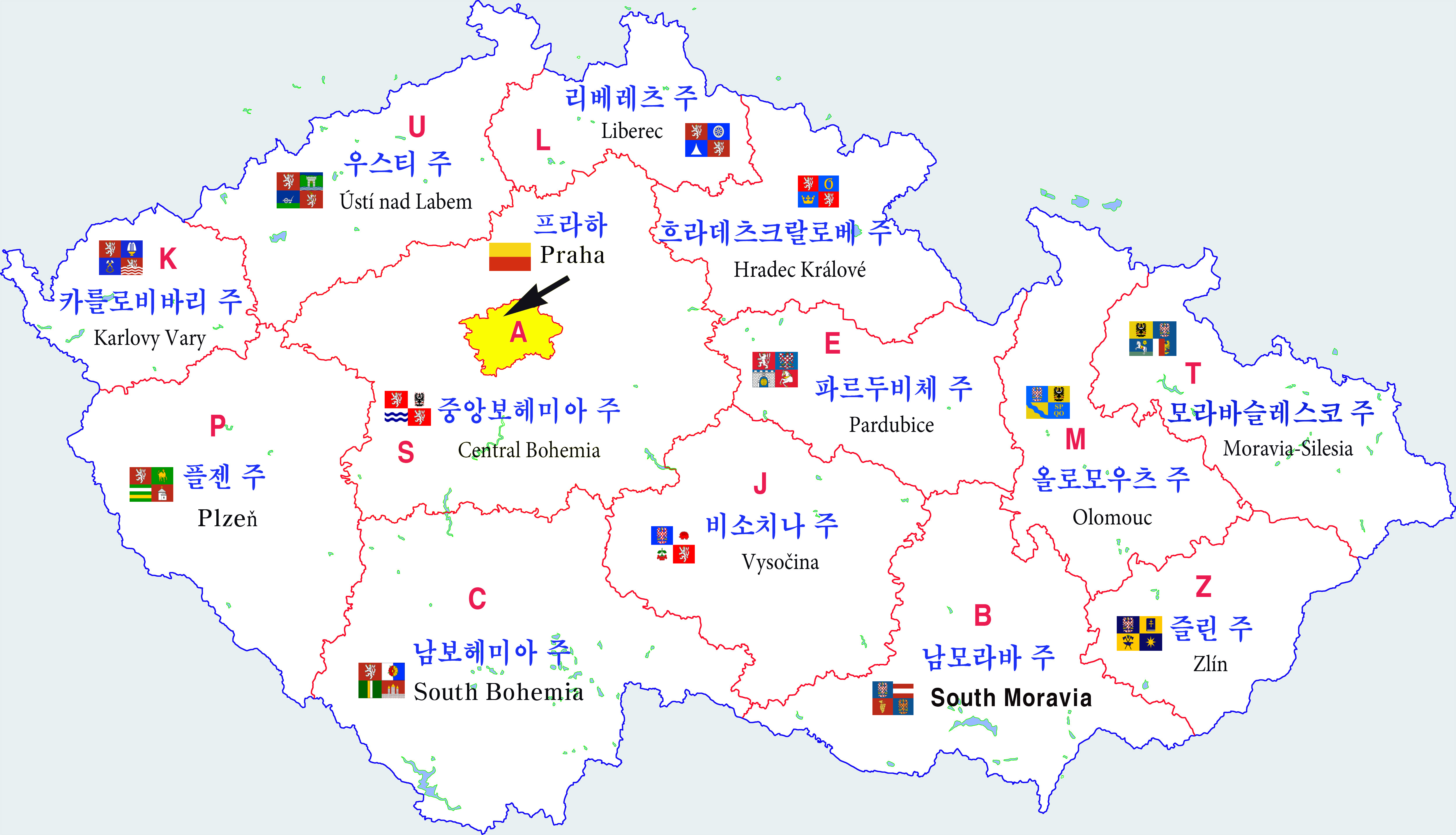 체코의 행정구역